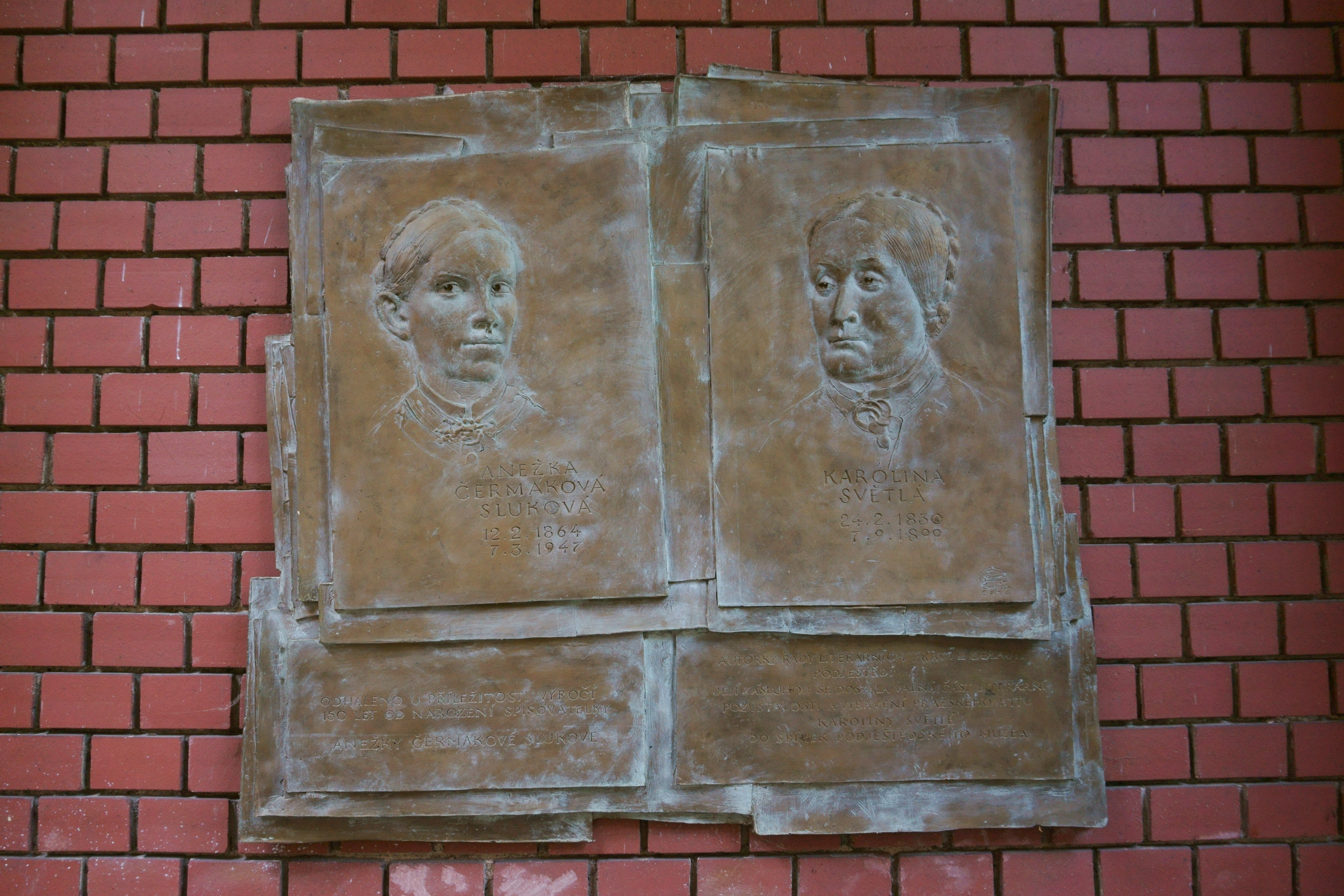 Český Dub, Blaschkeho vila, Podještědské muzeum, deska, Karolína Světlá a Anežka Čermáková-Sluková